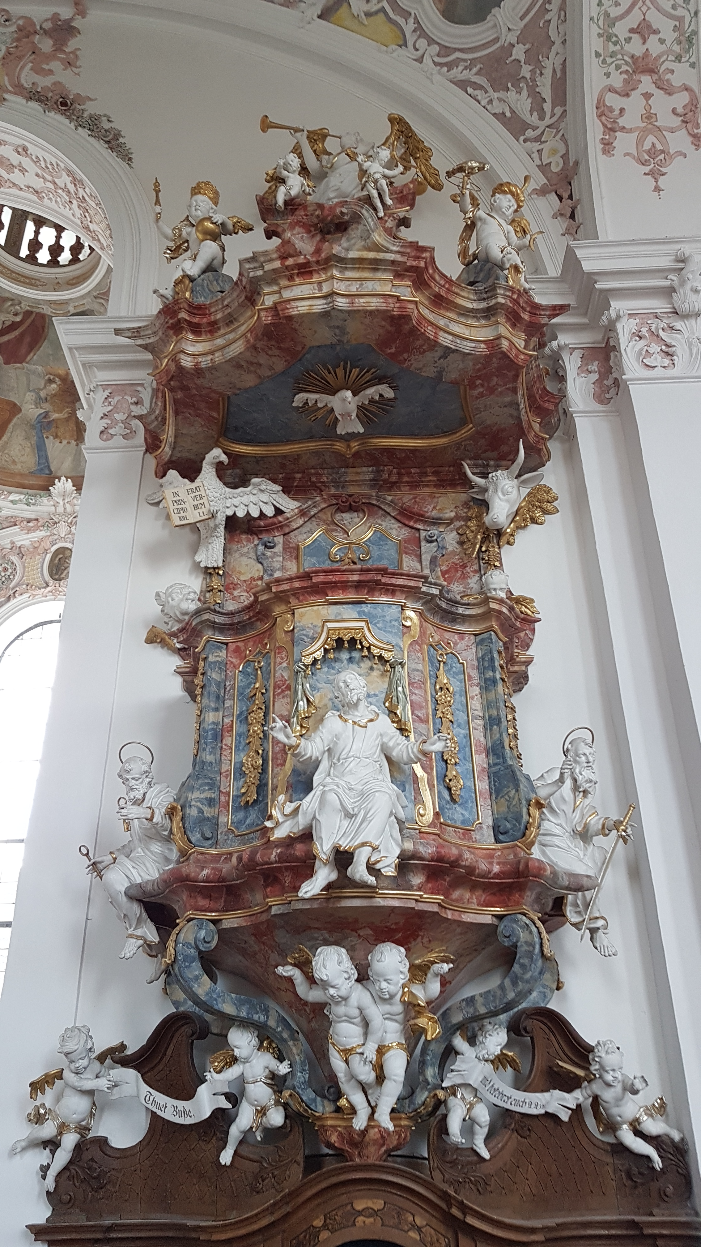 Sankt Michael (Bertoldshofen)